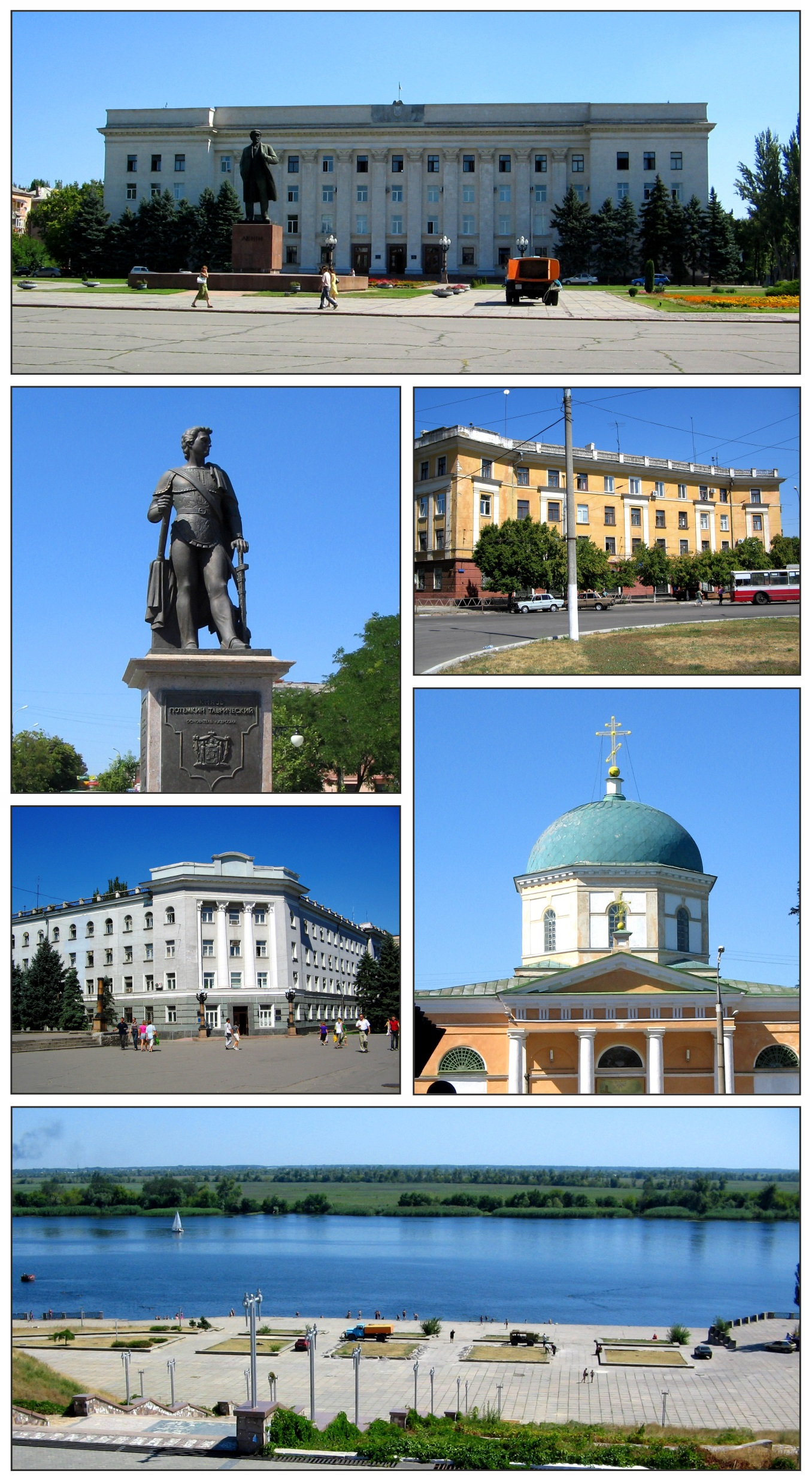 Коллаж из фотографий собственной съёмки.